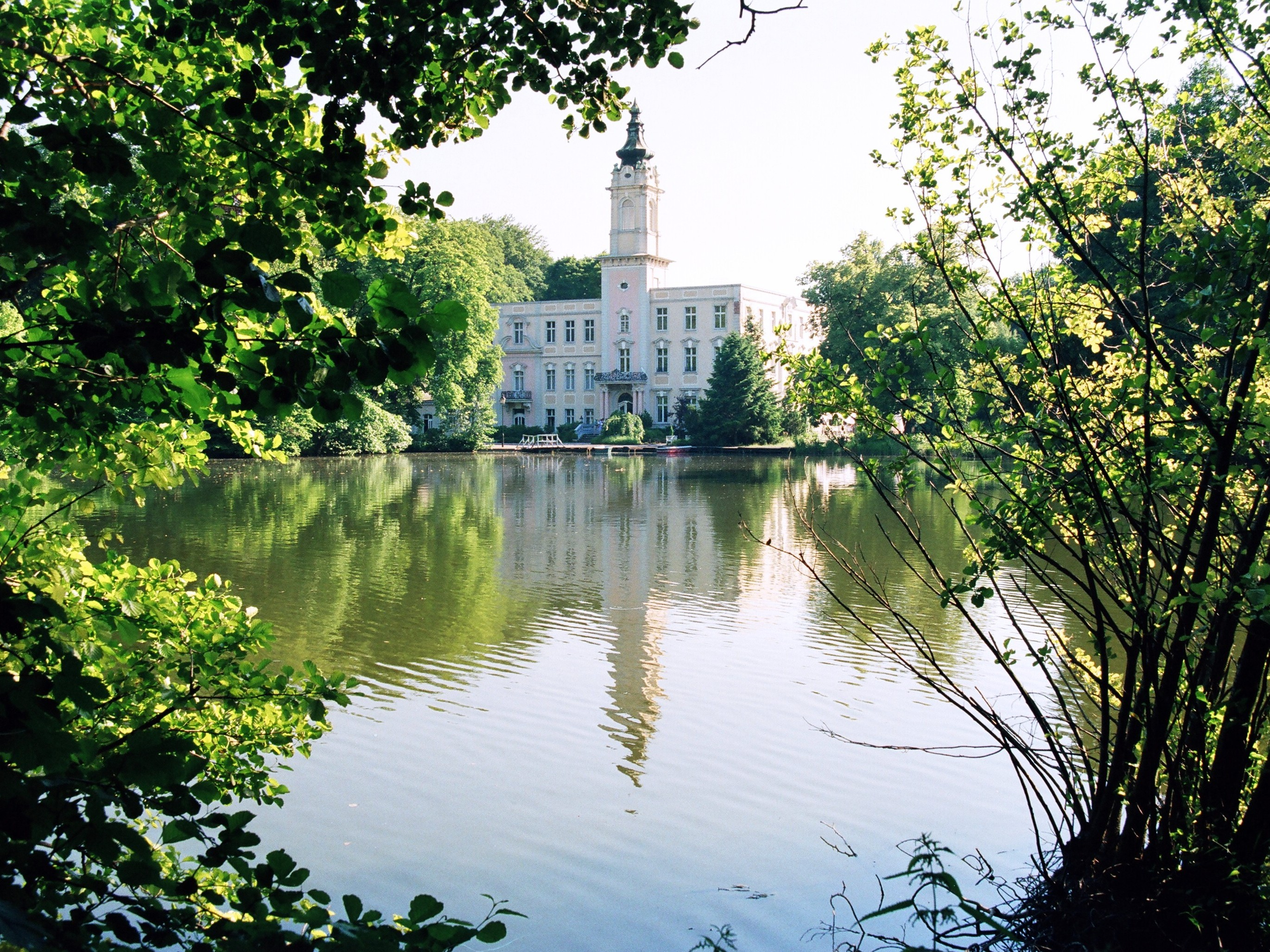 Schloss Dammsmühle / Mühlenteich, Schönwalde (Barnim), Gemeinde Wandlitz, Land Brandenburg, Deutschland